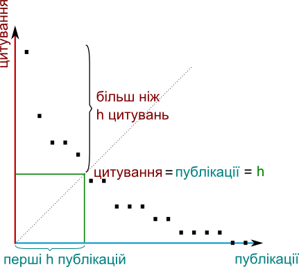 Індекс Гірша з графіка по зменшенню цитування публікацій